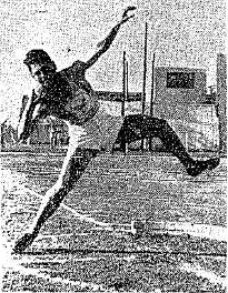 ברוך חבס הודף כדור ברזל 1958